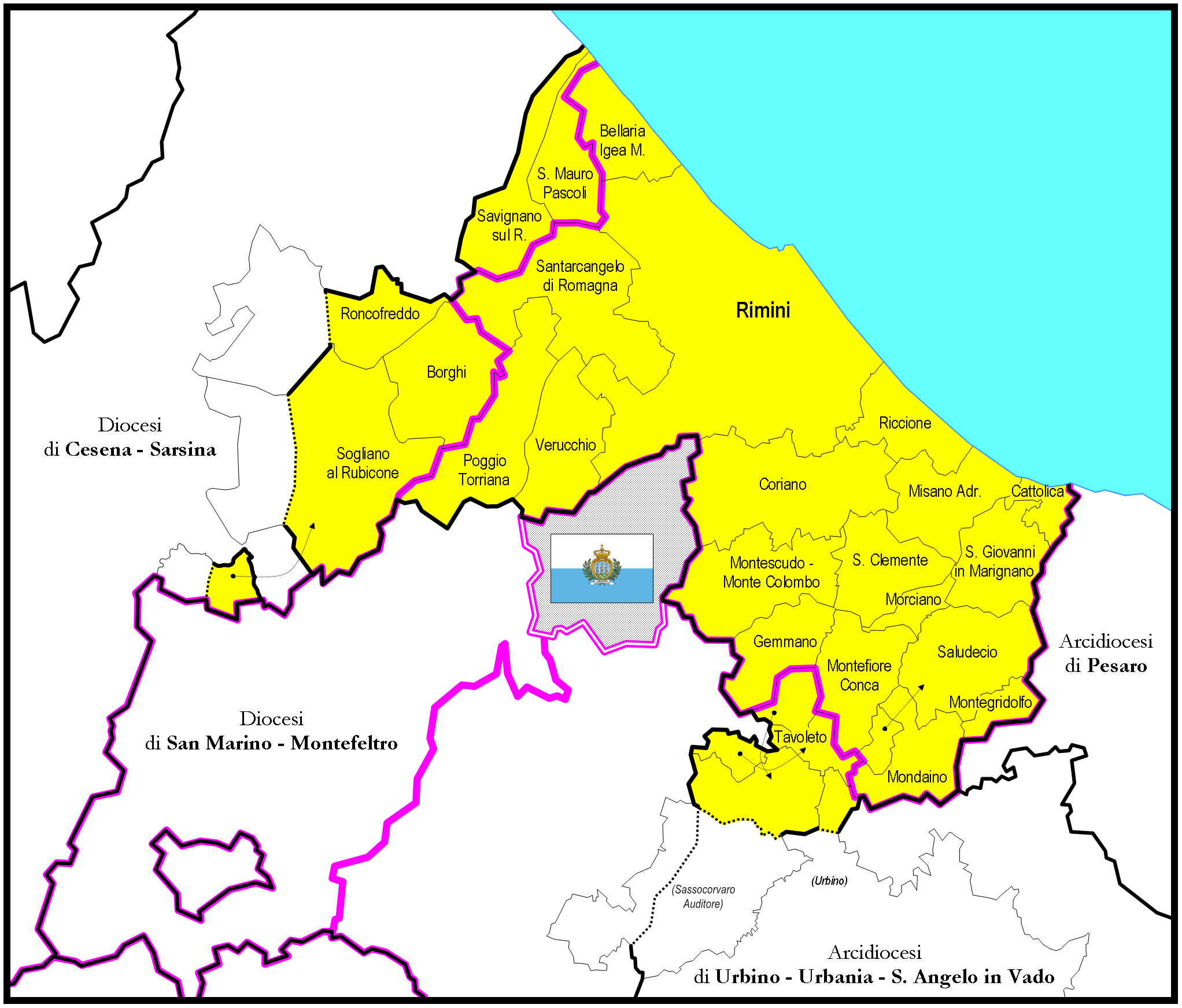 Mappa della Diocesi di Rimini